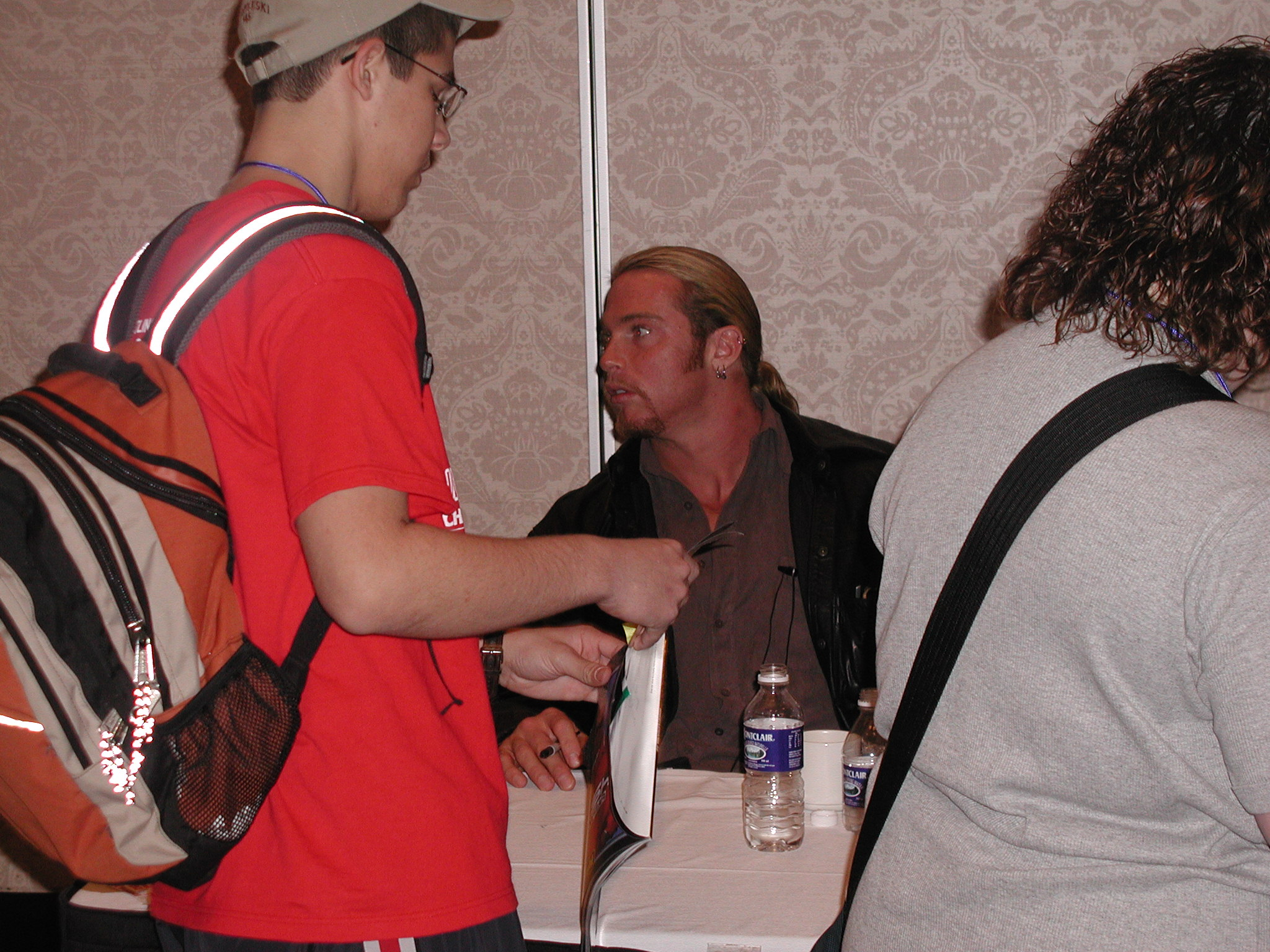 Andrew Martin (alias Test) signant des autographes en juin 2008.